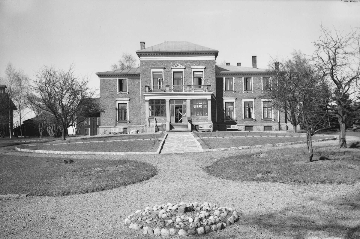 Vestre Grefsen gård. Foto: ANders Beer Wilse, fra Oslo Museums samling i Digitalt museum.